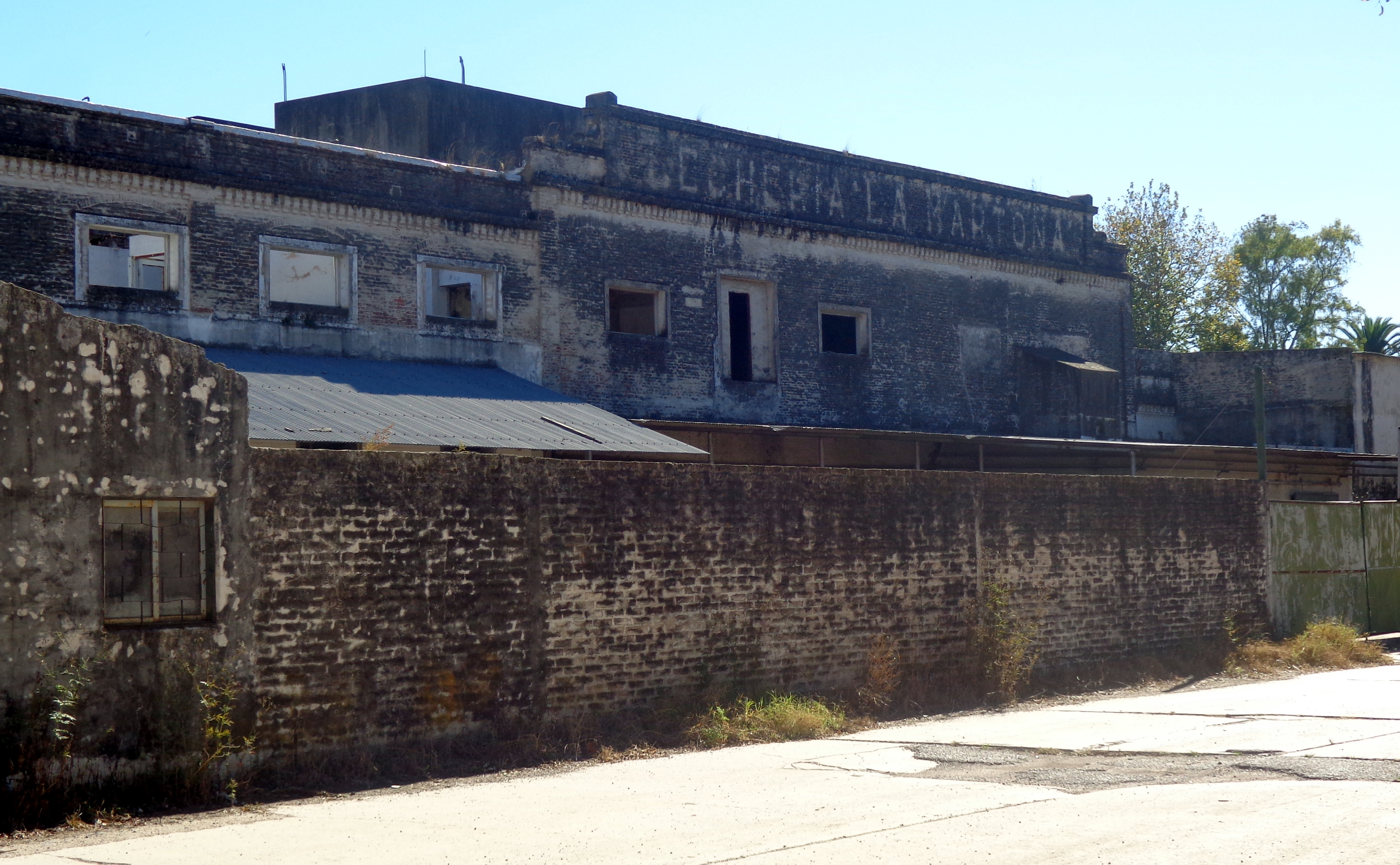 Ruinas de lo que fue la estancia La Martona en Vicente Casares, Provincia de Buenos Aires, Argentina.